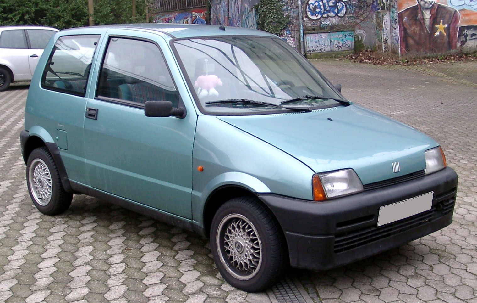 Fiat Cinquecento